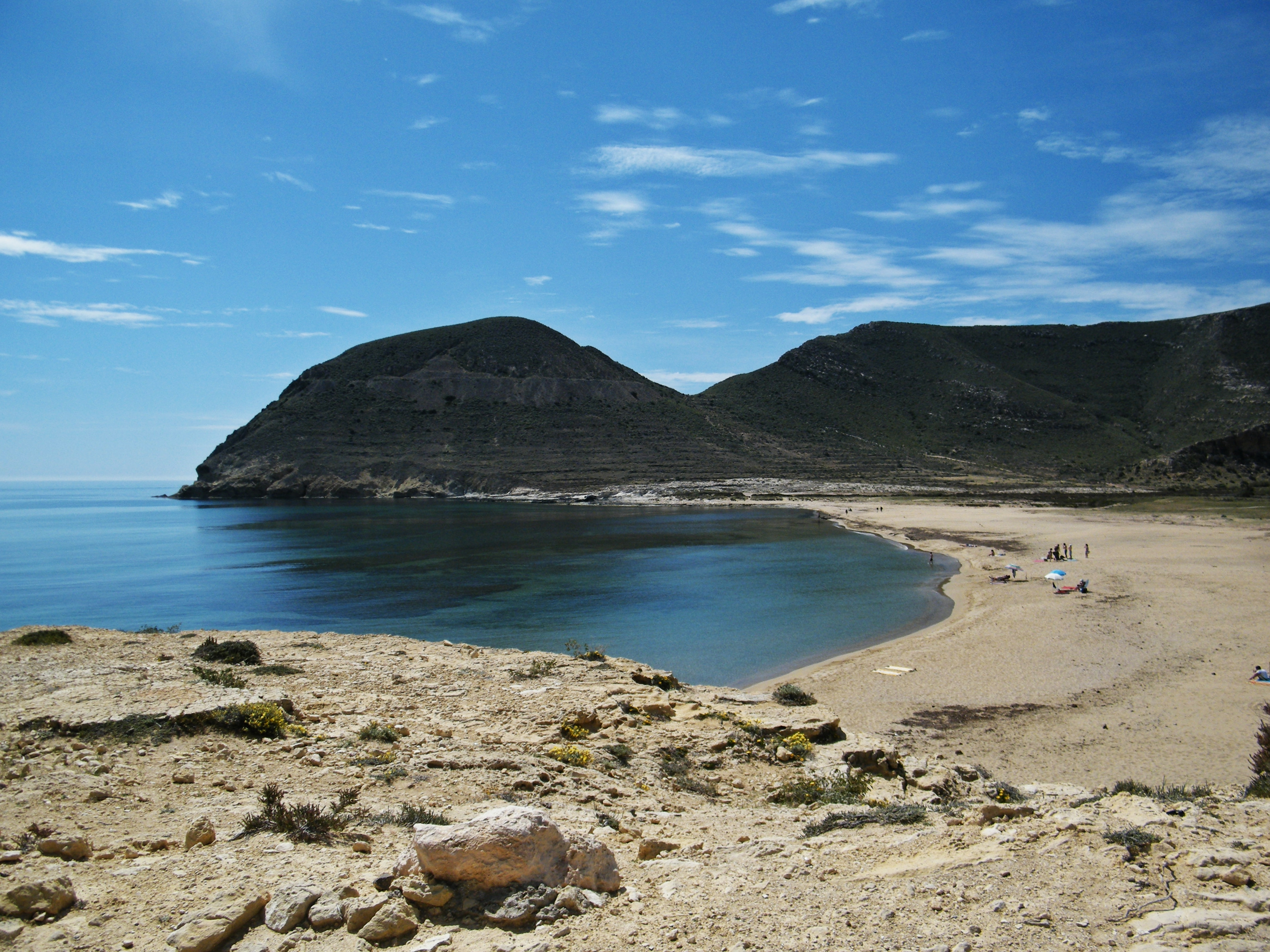 Esta hermosa y tranquila playa de aguas azules se extiende entre el Cerro de la Molata y la Batería de San Ramón, en Rodalquilar. Almería.